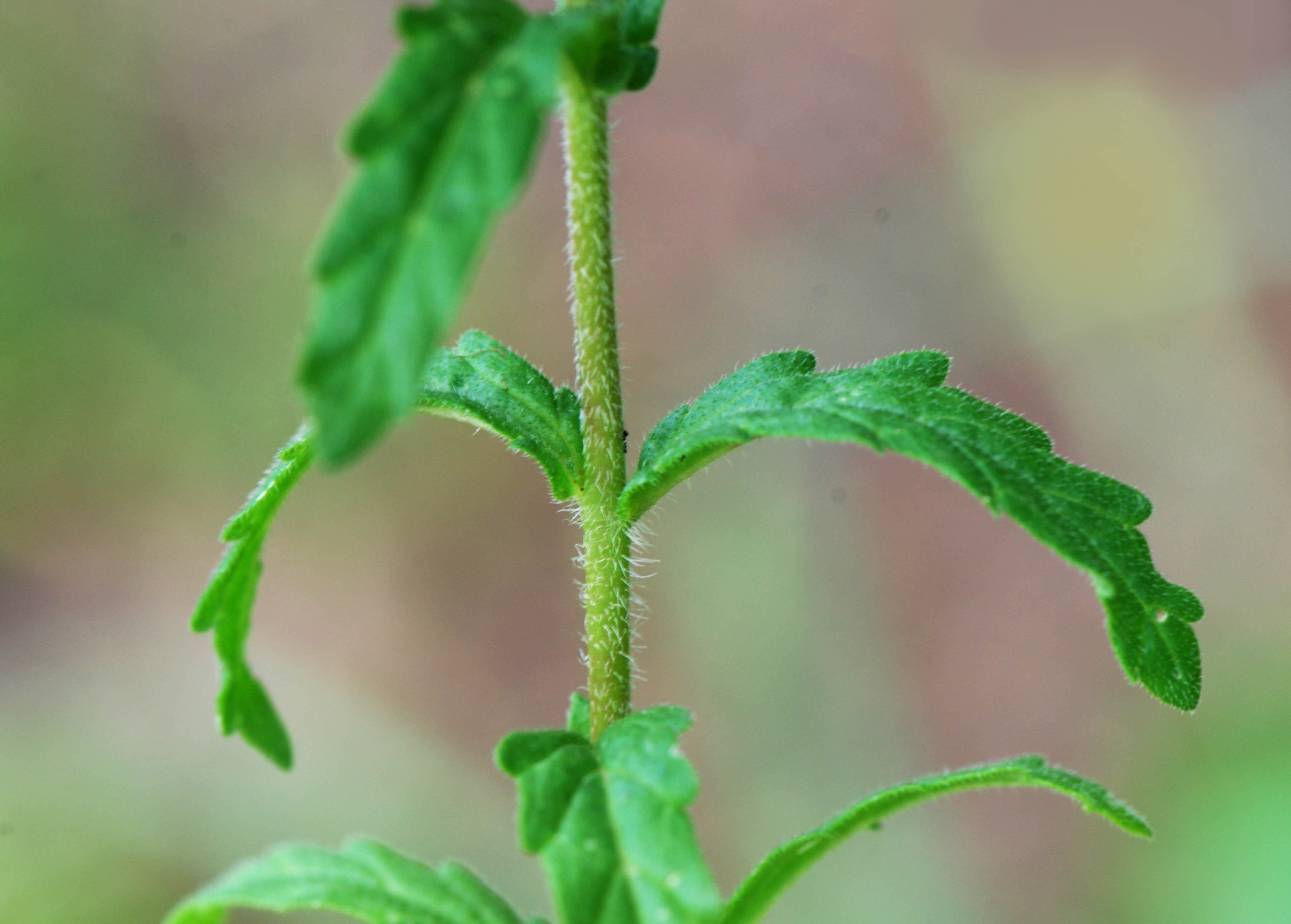 Bartsia trixago, feuilles de Bartsie trixago, Monacia, Corse